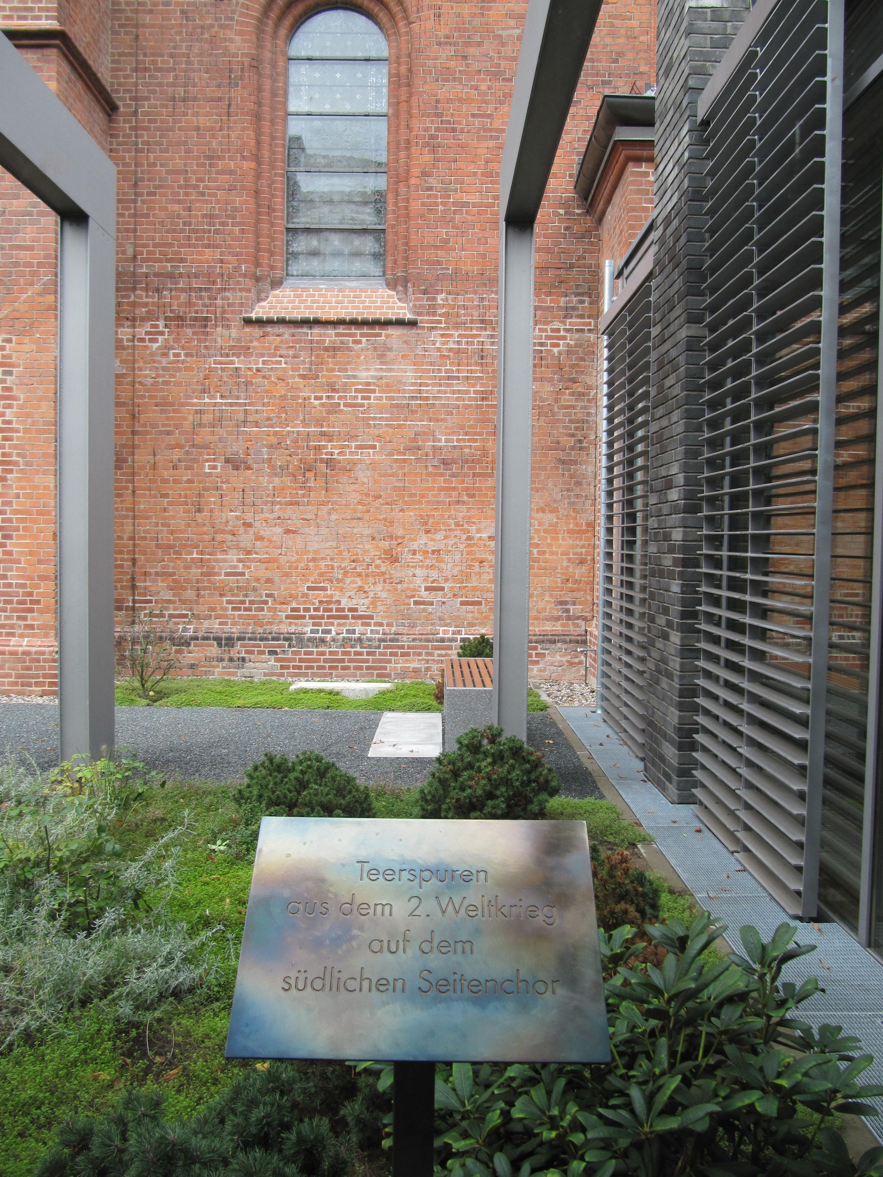 Spuren des Zweiten Weltkrieges